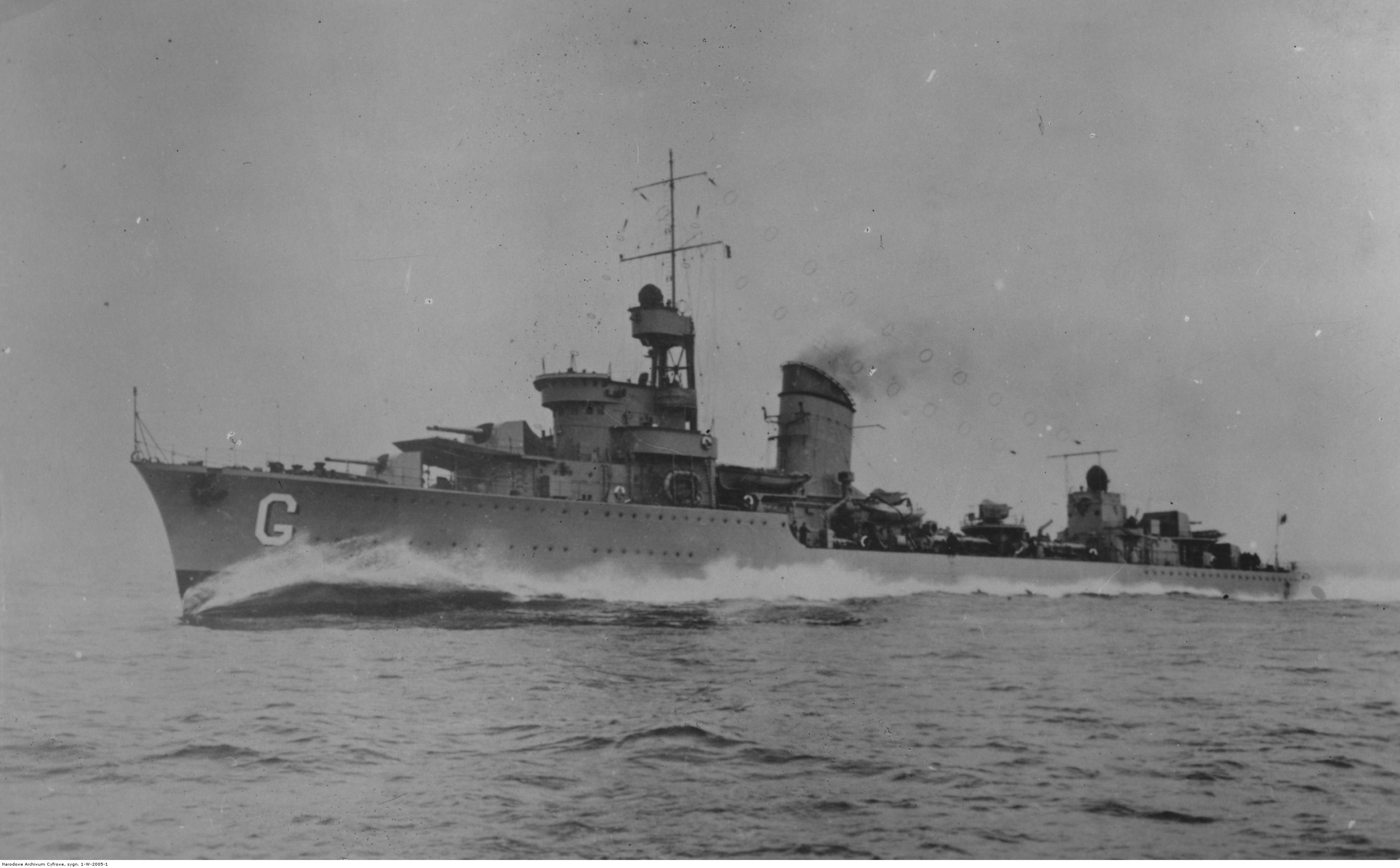 Niszczyciel ORP "Grom" w marszu z dużą prędkością.